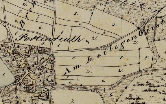 Lageplan von Portenreuth